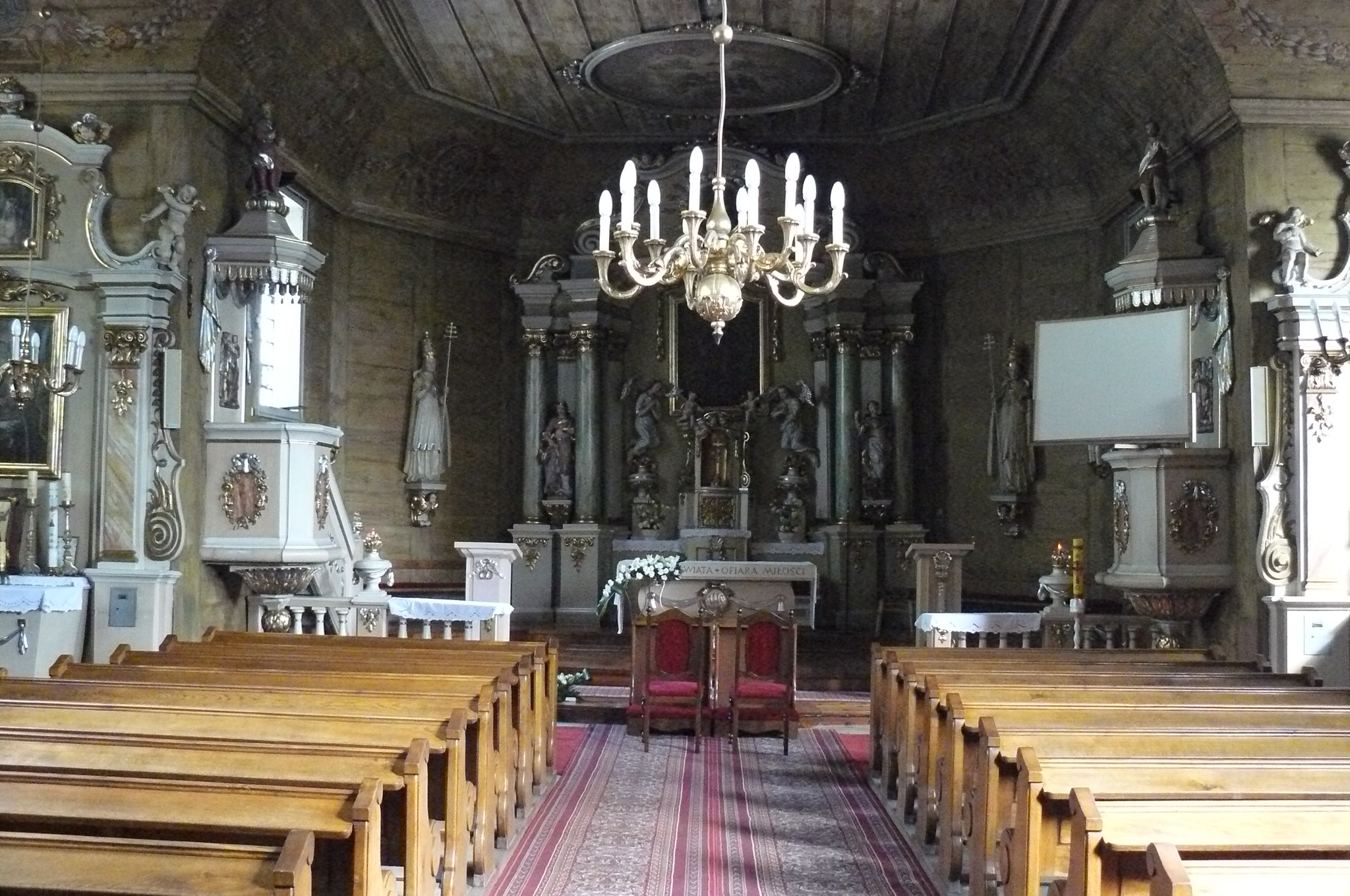 Żabno (powiat Śrem). Kościół.